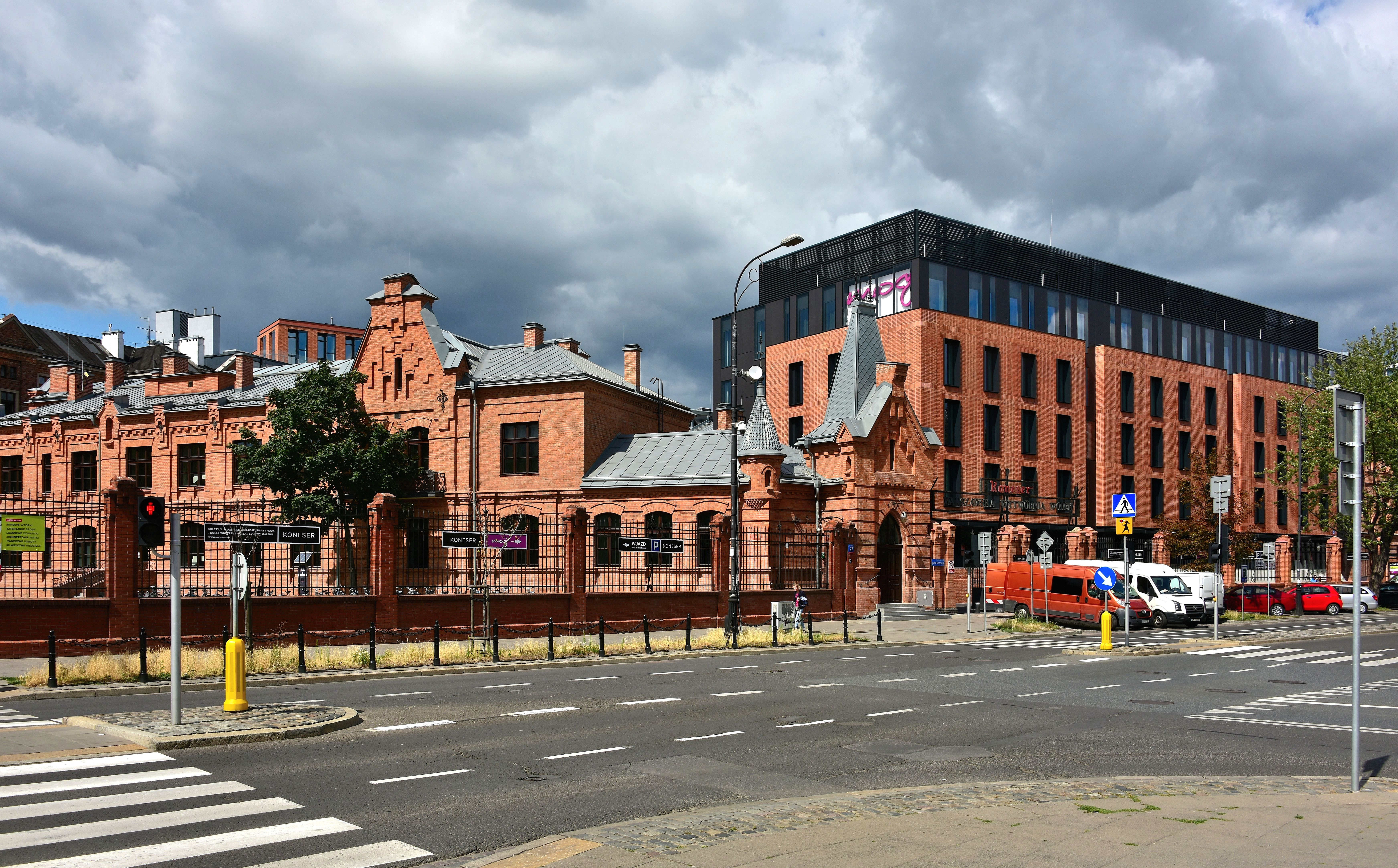 Centrum Praskie Koneser od strony ul. Ząbkowskiej